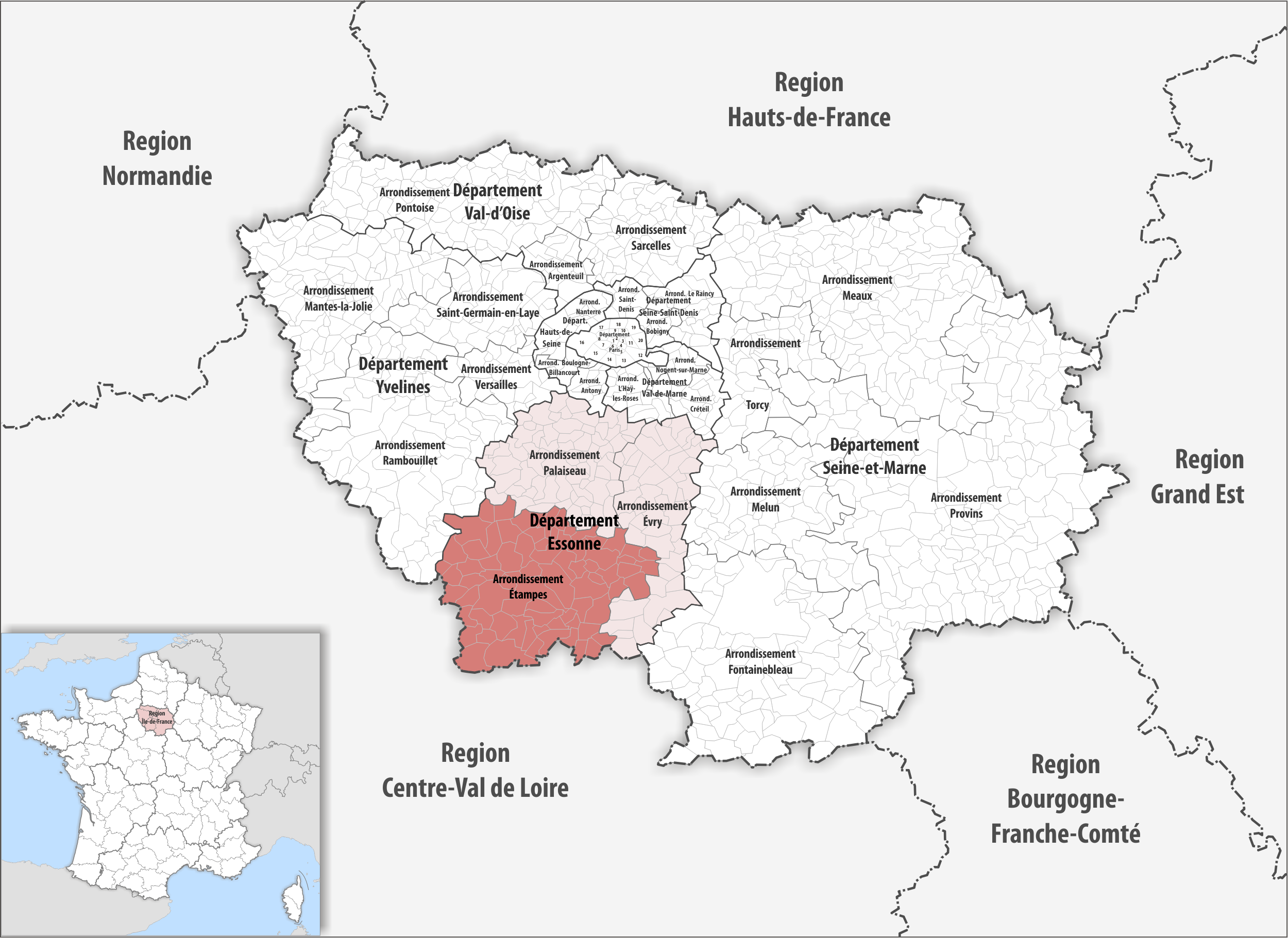 Lage des Arrondissements Étampes